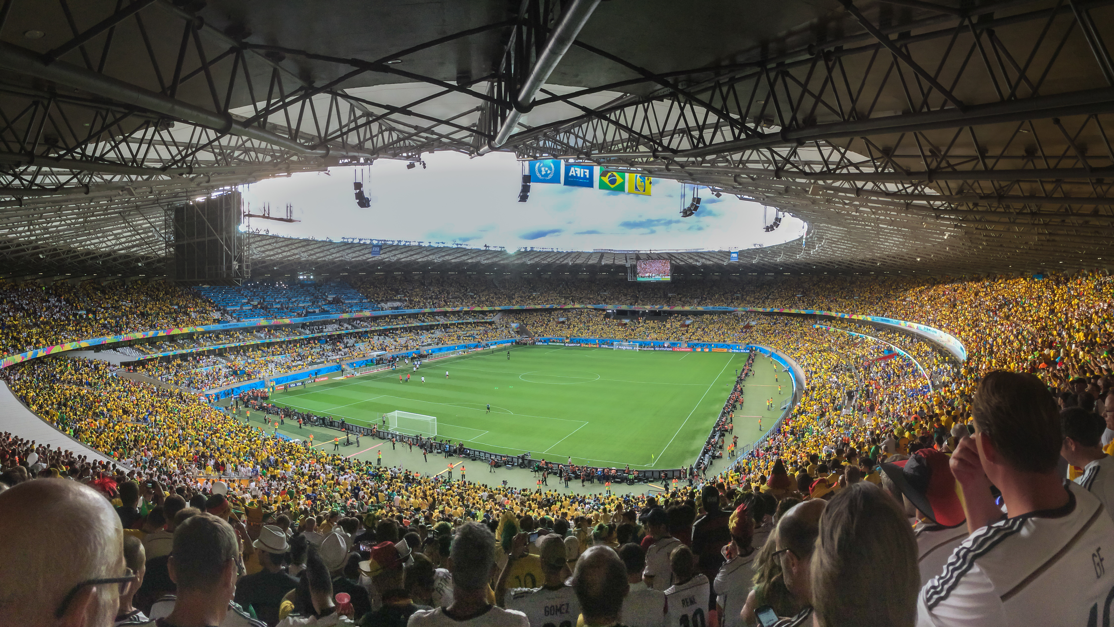 Stadion Belo Horizonte Halbfinale WM 2014